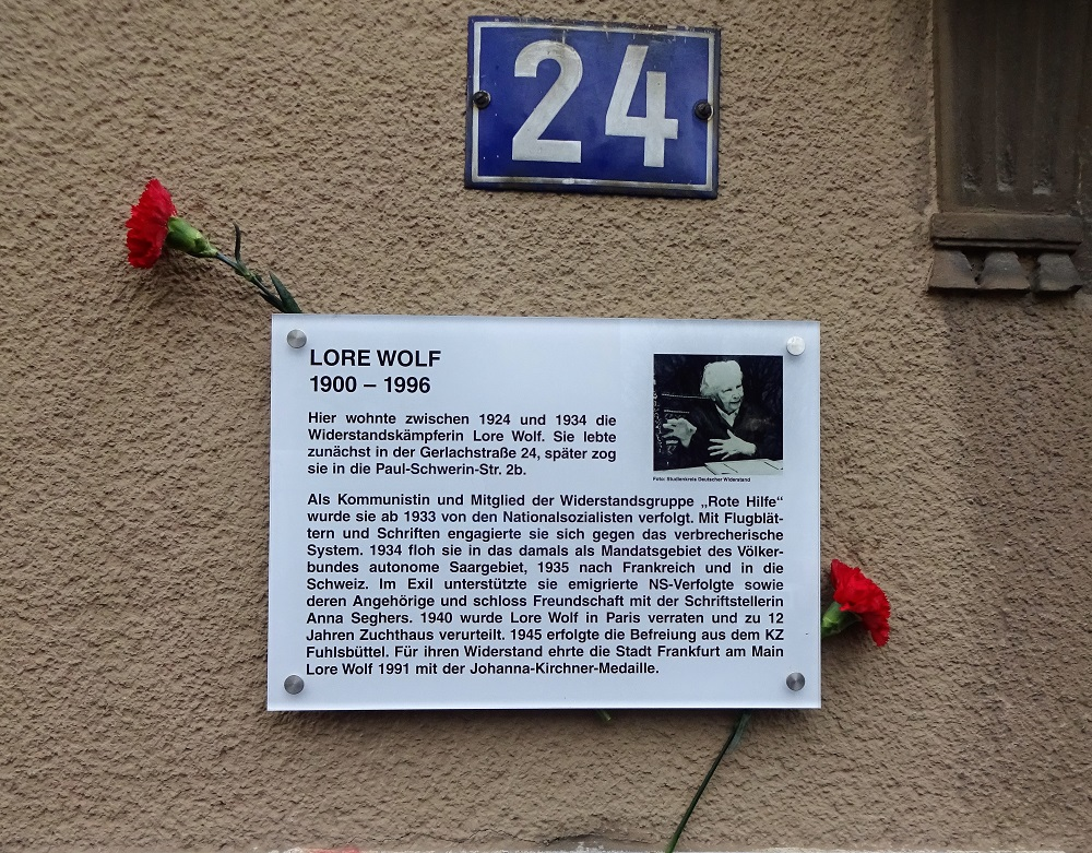 Seit dem 11. März 2020 erinnert eine Gedenktafel am früheren Wohnhaus von Lore Wolf an die Widerstandskämpferin. Lore Wolf wohnte in der Gerlachstraße 24 in Frankfurt am Main, Stadtteil Höchst von 1924 bis 1934.